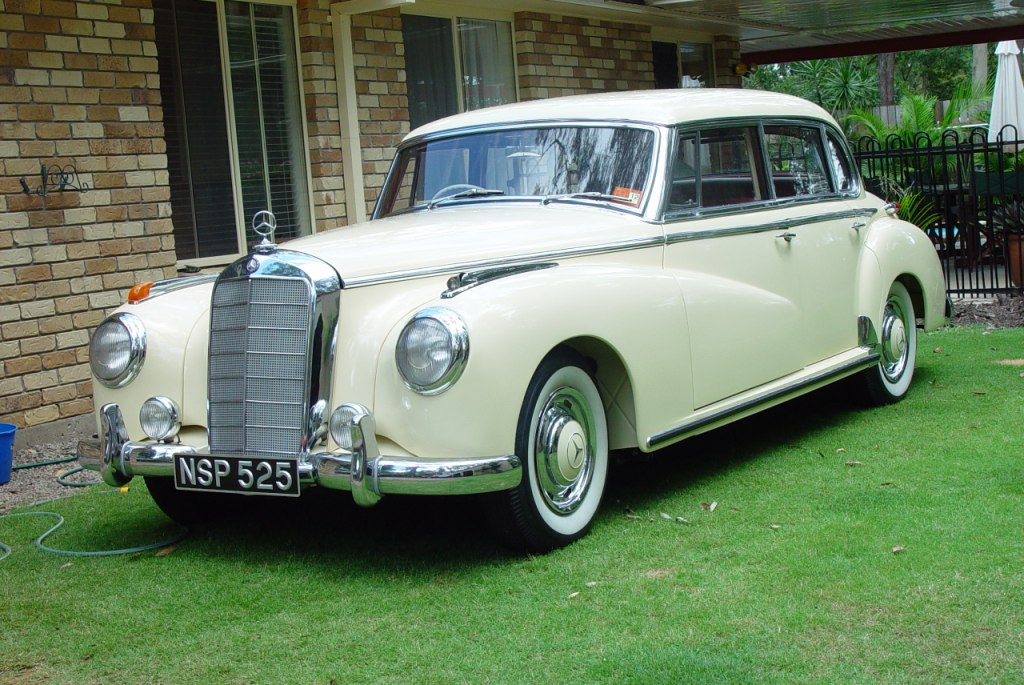 1955 Mercedes-Benz 300b